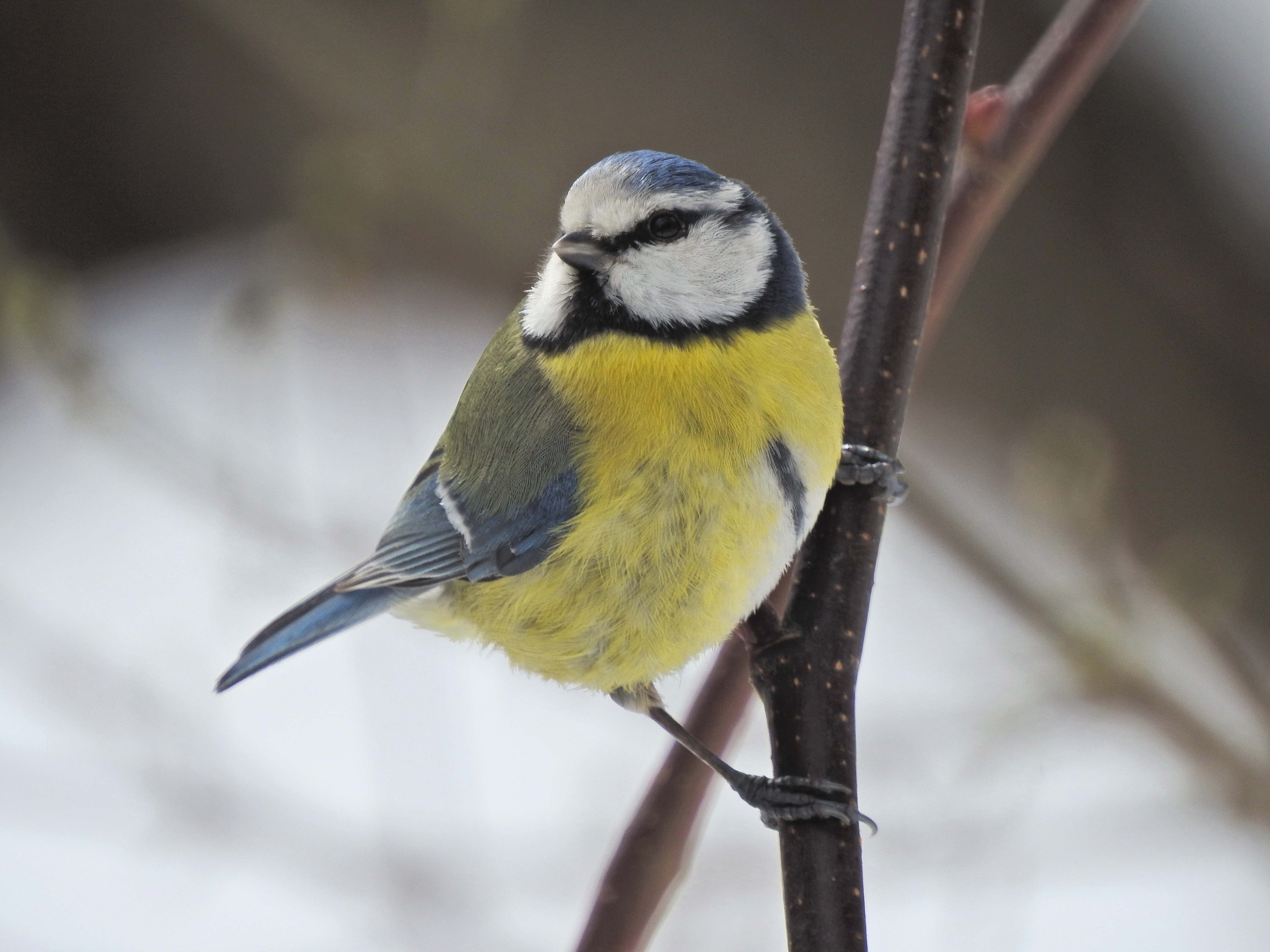 blue tit Blaumeise pițigoi albastru